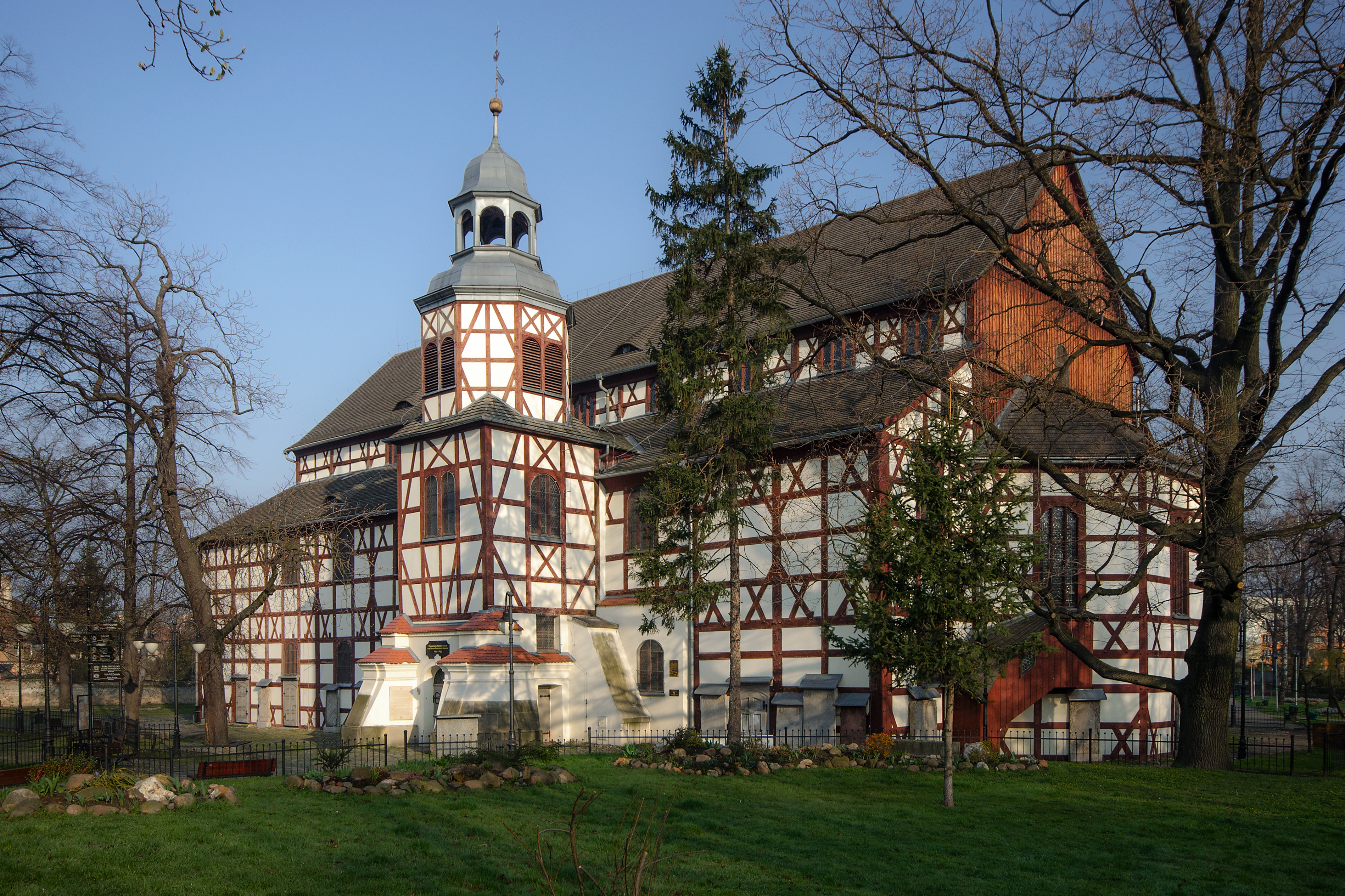 Jawor, kościół ewangelicki (Pokoju), 1654-1656, 1709